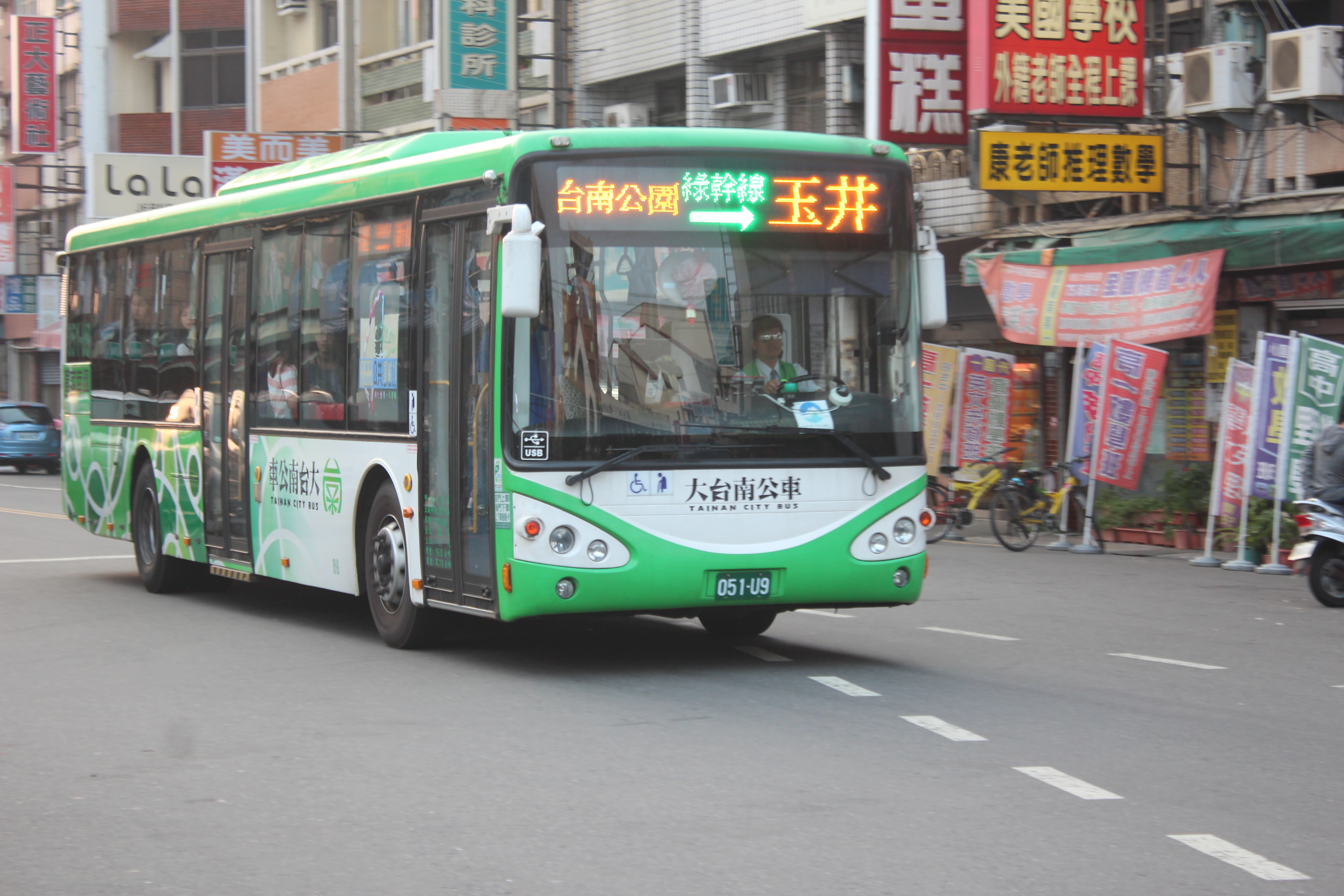 SUNWIN SWB6127